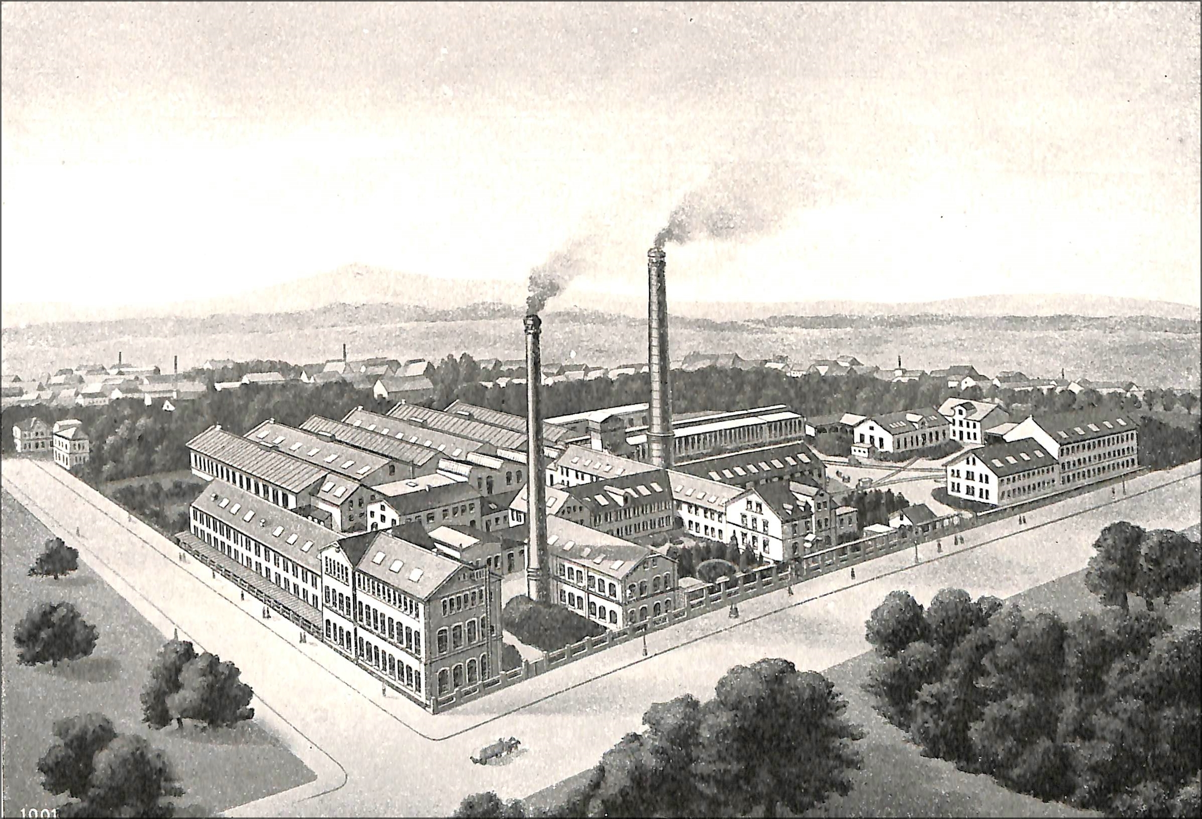 Braunschweig - fiktive Ansicht der Firma Maschinenfabrik und Eisengießerei Grimme, Natalis & Co.